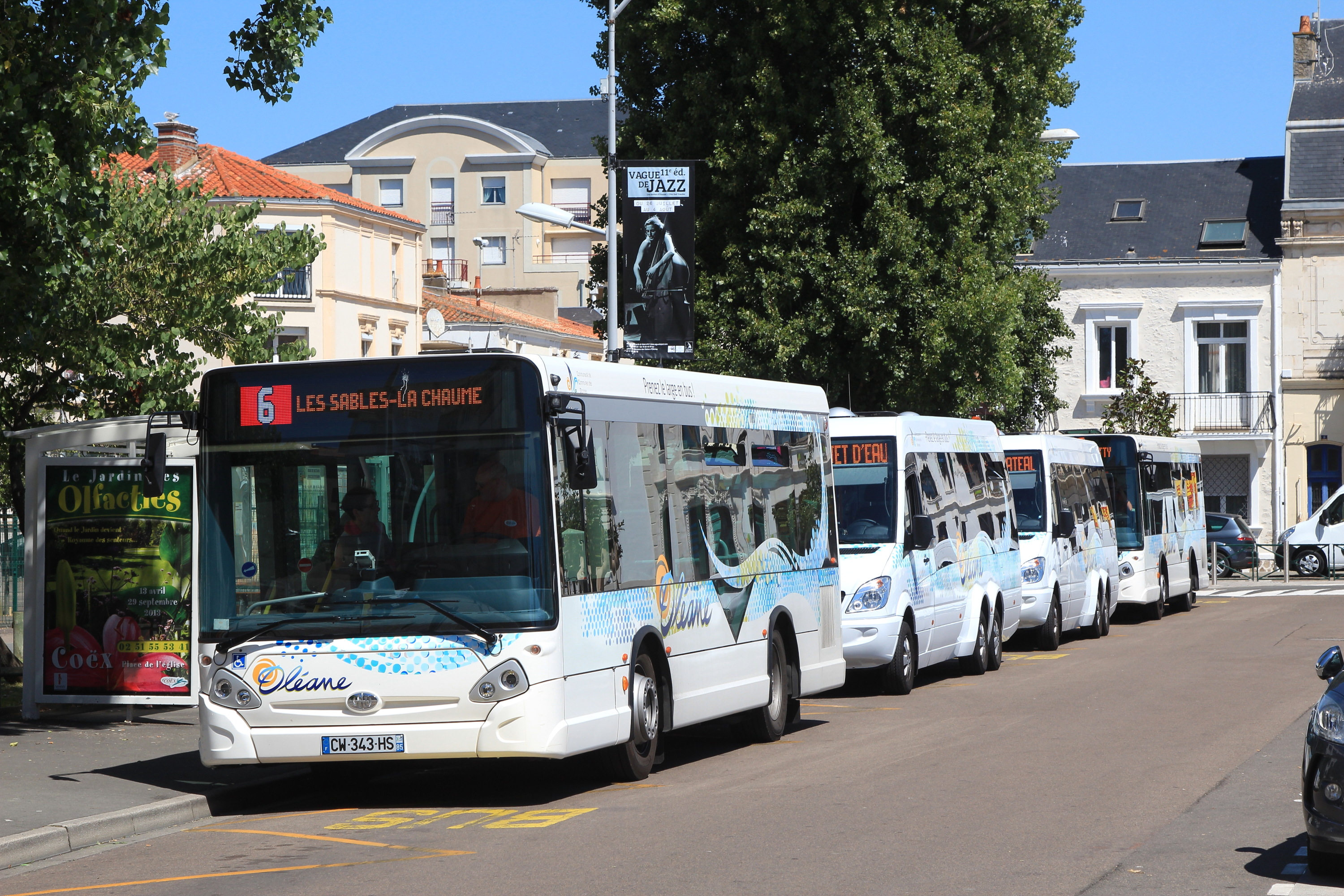 Bus au terminus de toutes les lignes des Sables-d'Olonne.